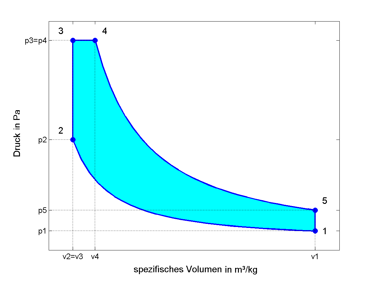 pv-Diagramm des Seilinger-Prozesses